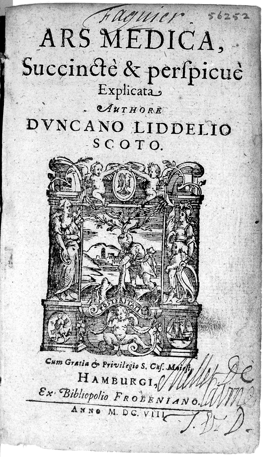 Rare Books Keywords: Duncan Liddel